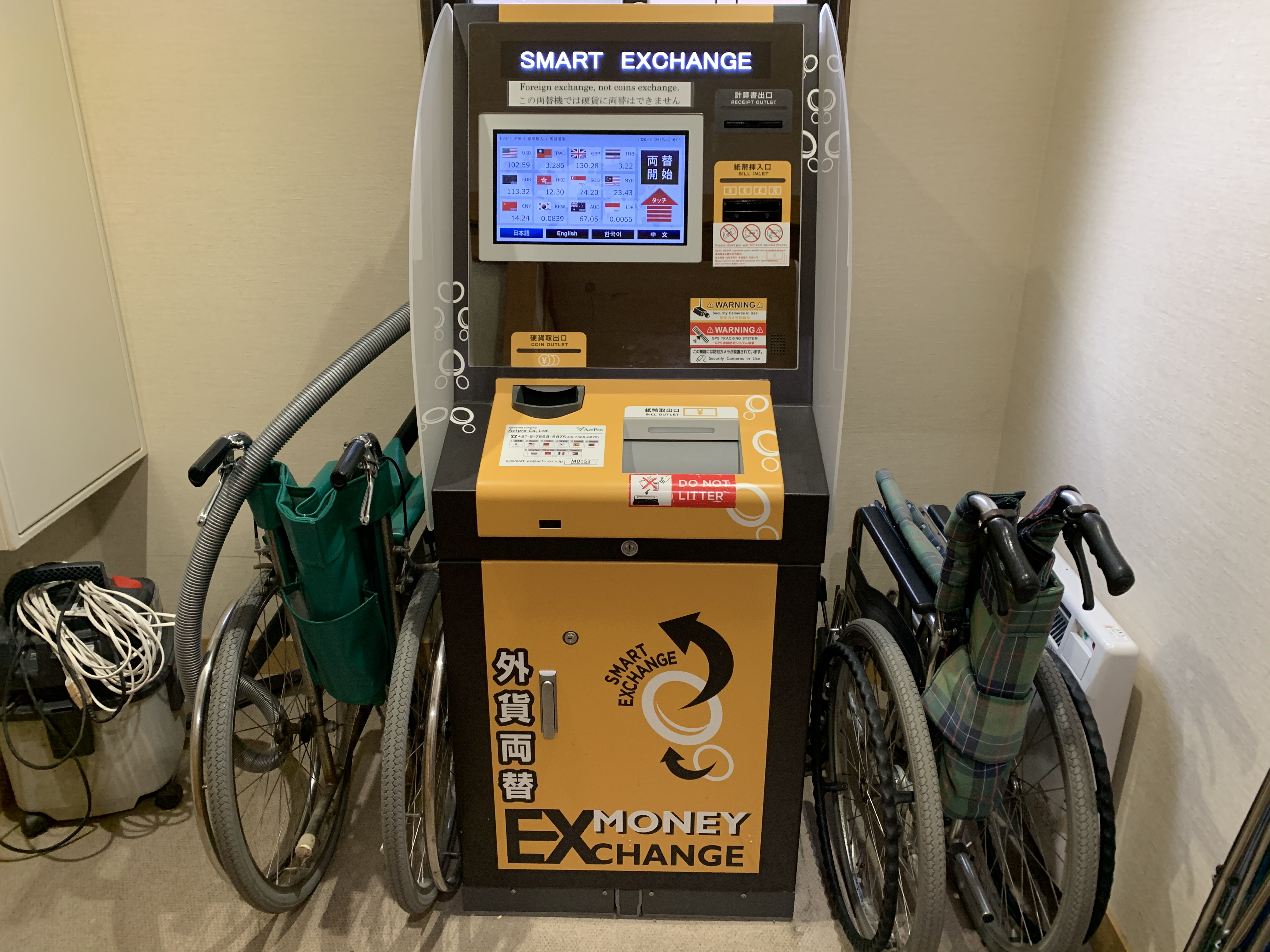 白川鄉巴士總站兌幣機與輪椅。